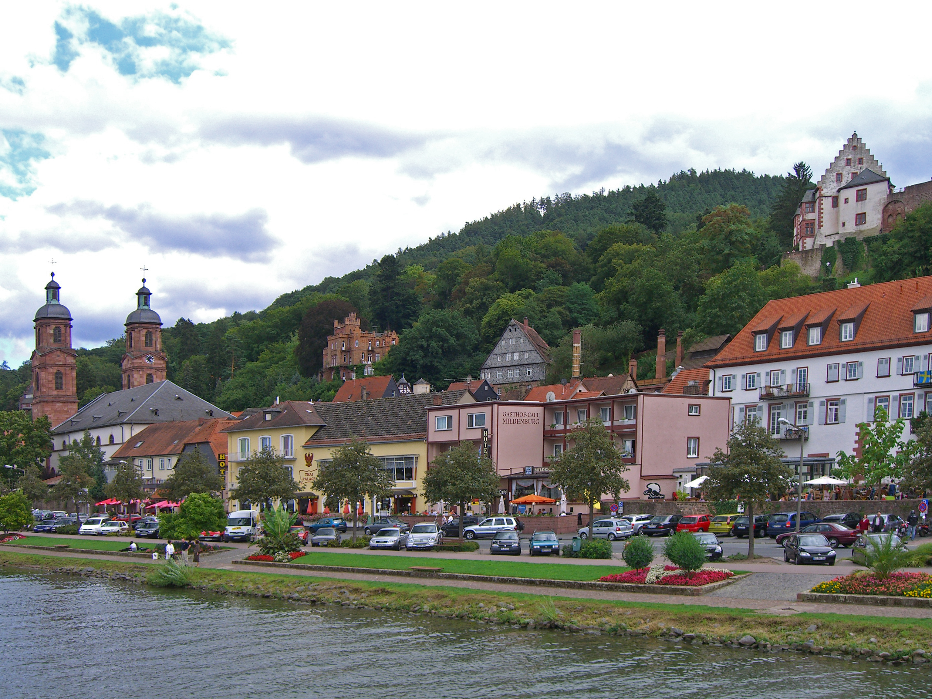 Miltenberg, vom Wasser aus aufgenommen